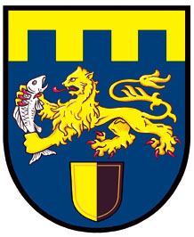 Znak obce Hamr na Jezeře